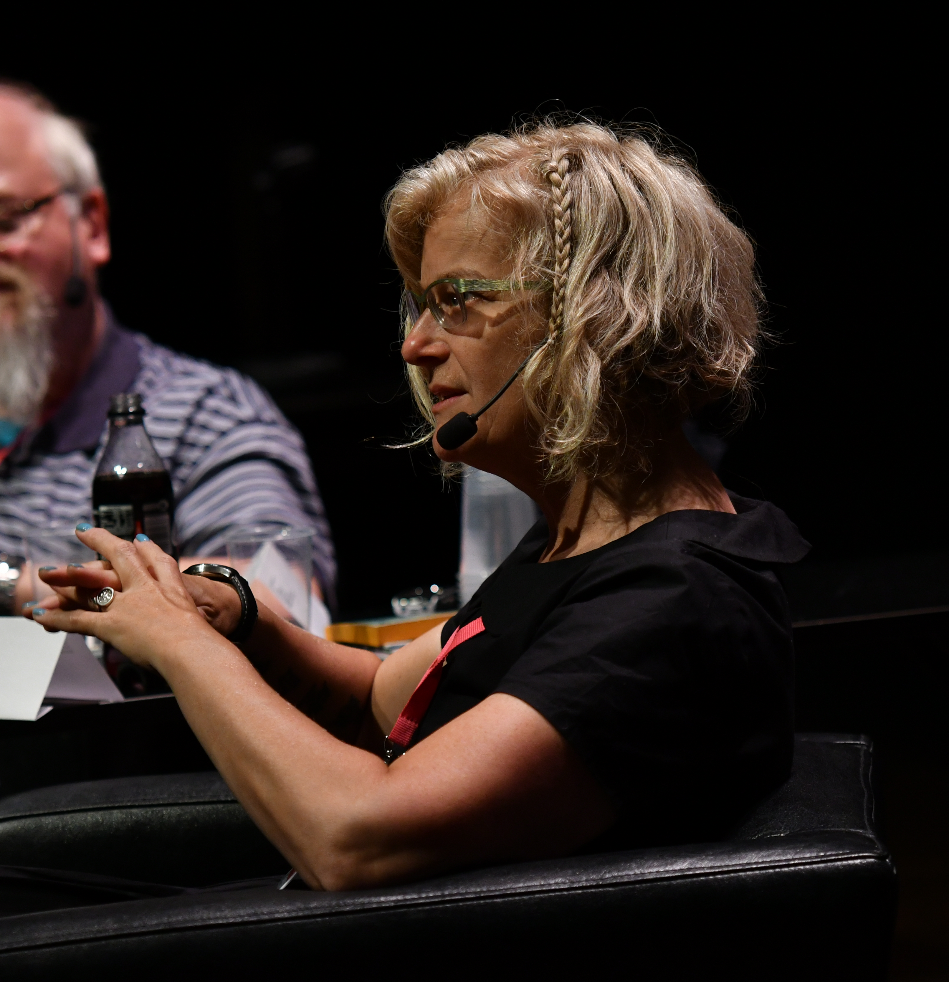 Flemming Rasch intervjuar Kij Johnson på Fantastika 2018, Swecon 2018.